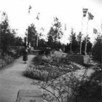 Bundesgartenschau 1957 in Köln - Bastion